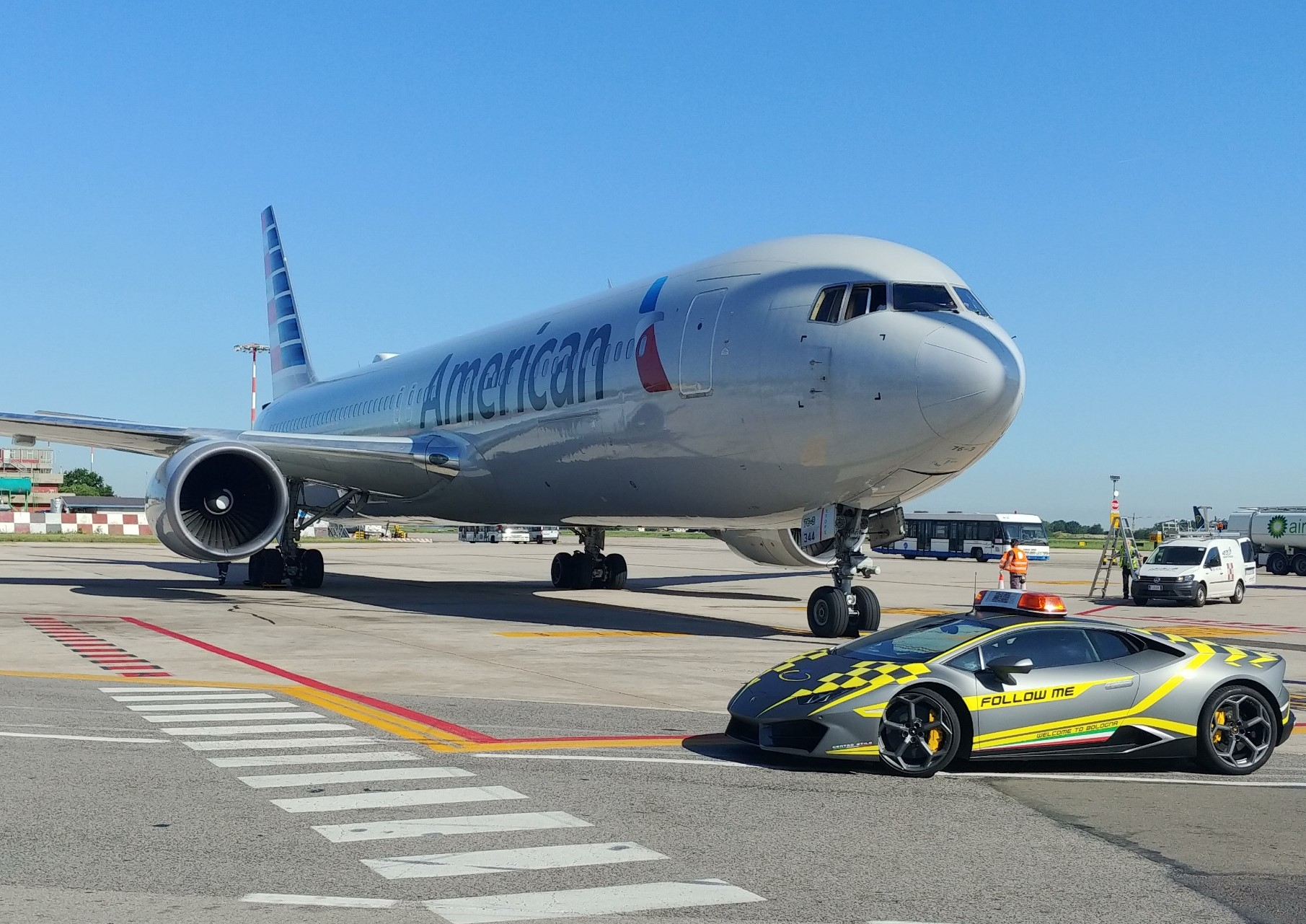 Un B767-300ER American Airlines impiegato sulla rotta quadrisettimanale Bologna-Philadelphia